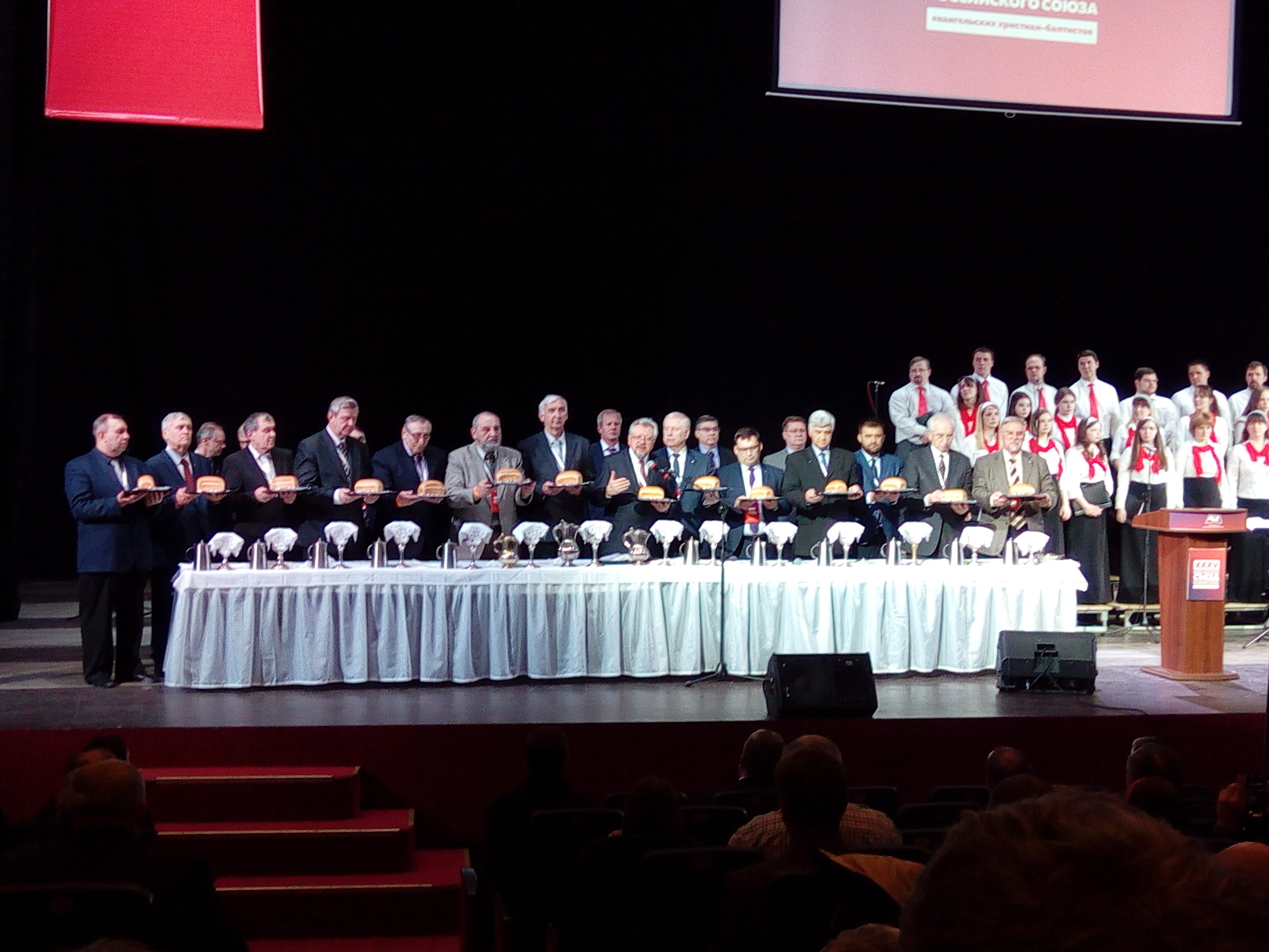 Приготовление к совершении Вечери участниками 35 съезда евангельских христиан-баптистов России. Март 2018